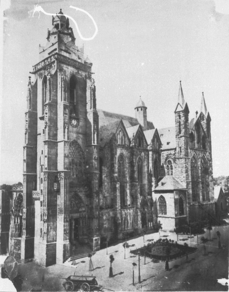 Wetzlarer Dom - Ansicht von Südwest, Aufnahme um 1870